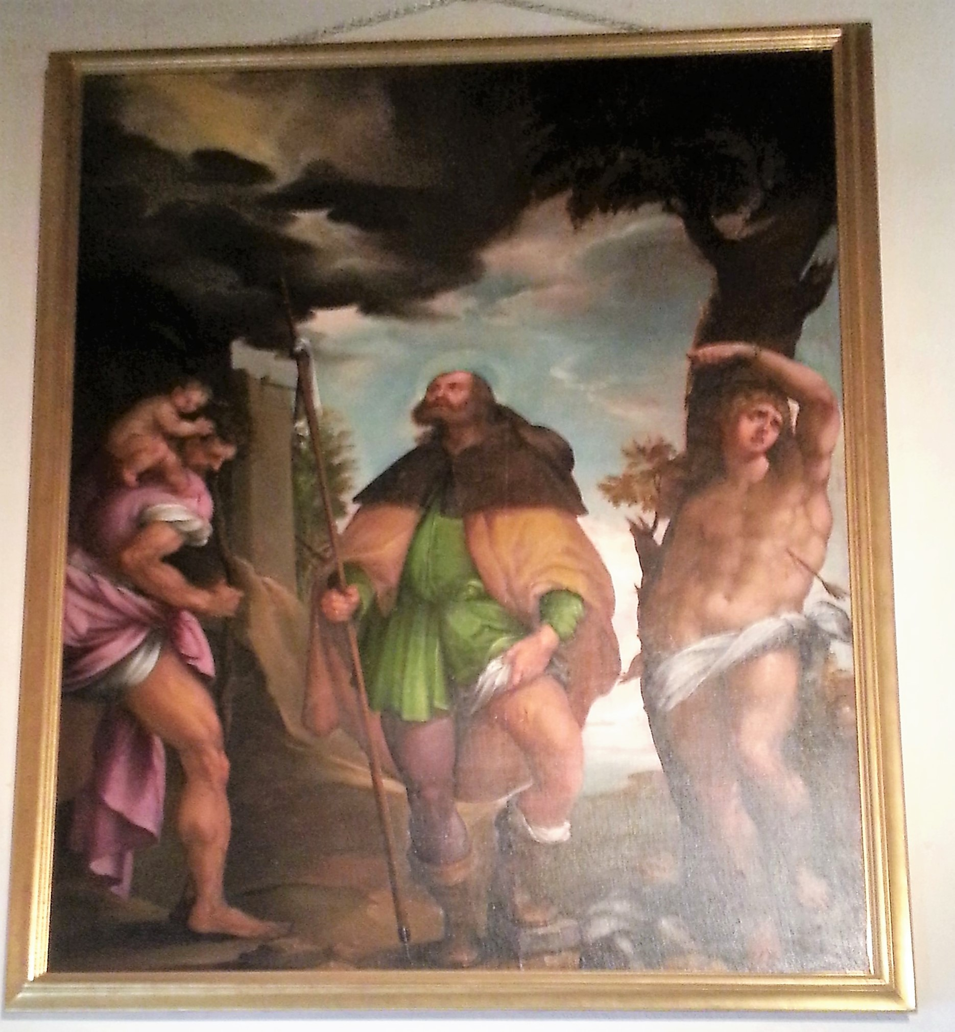 dipinto di Domenico Carpinoni raffigurante San Rocco, san Sebastiano